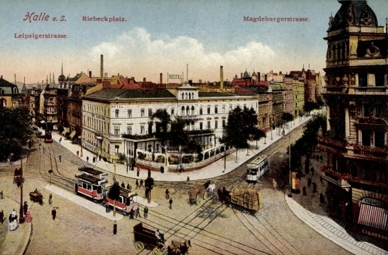 Halle, Riebeckplatz